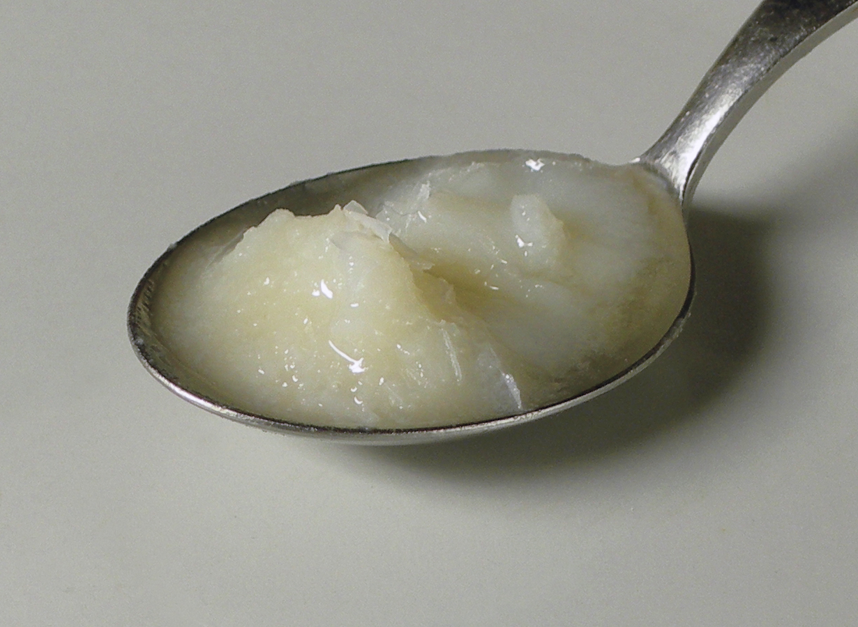 Gänseschmalz